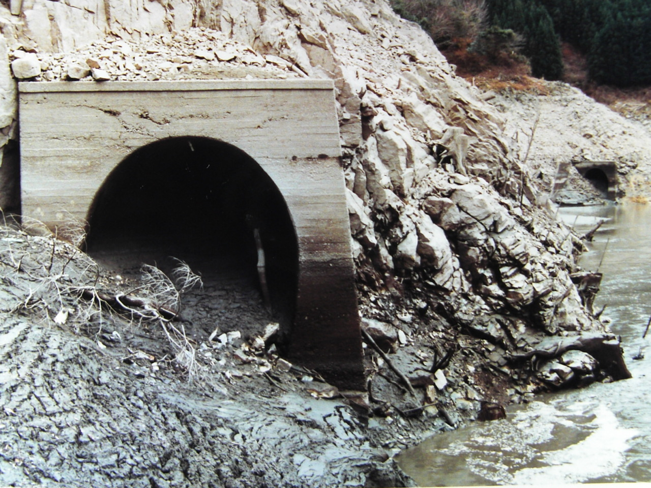 飯田線佐久間ダム水没区間土木構造物 白神～天竜山室間